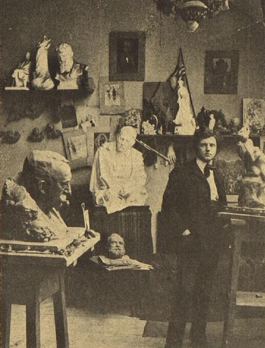 Karel Opatrný (1881-1961), český sochař a medailér